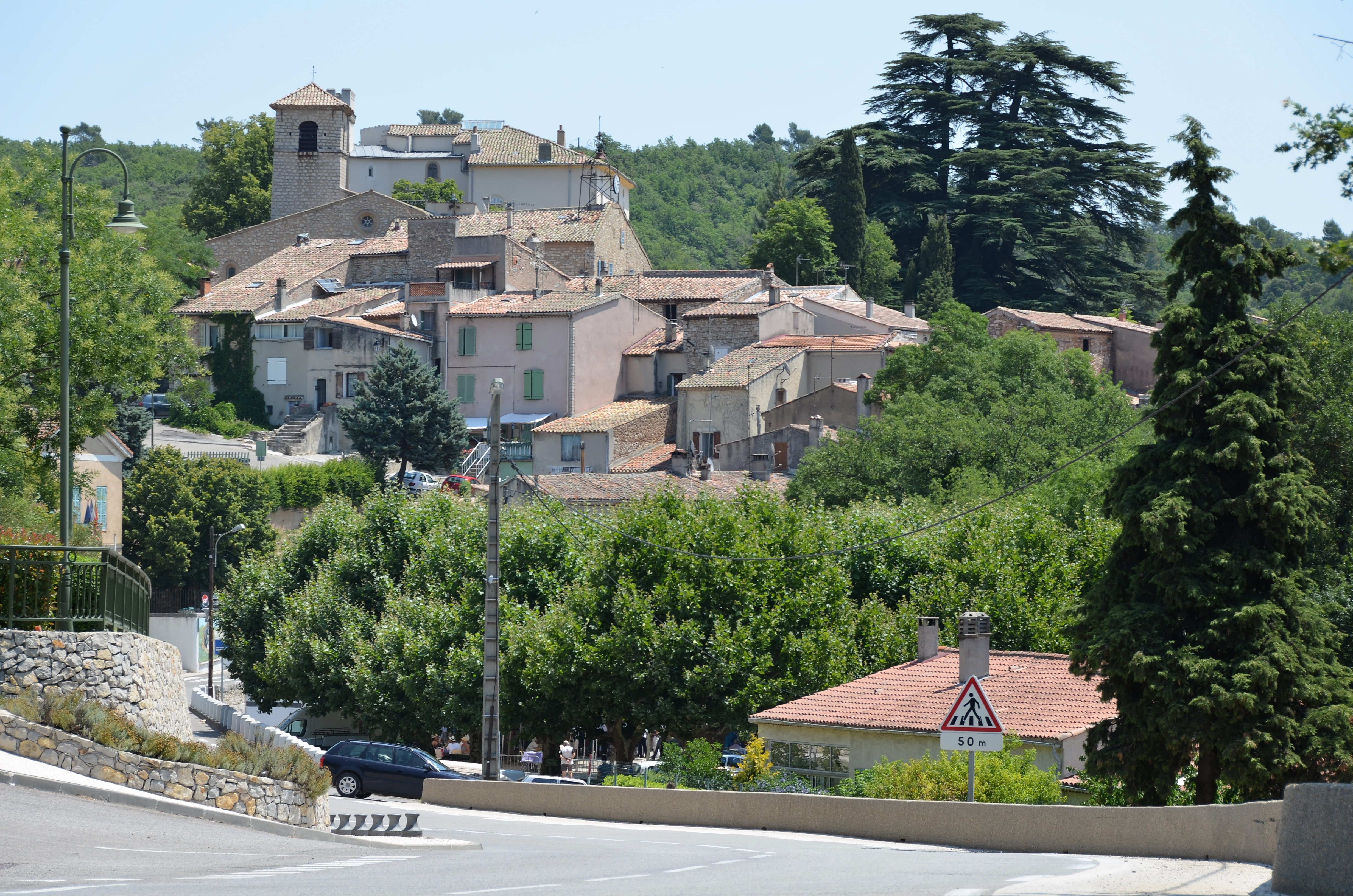 Vue du village d'Ollières. Département du Var (83). France